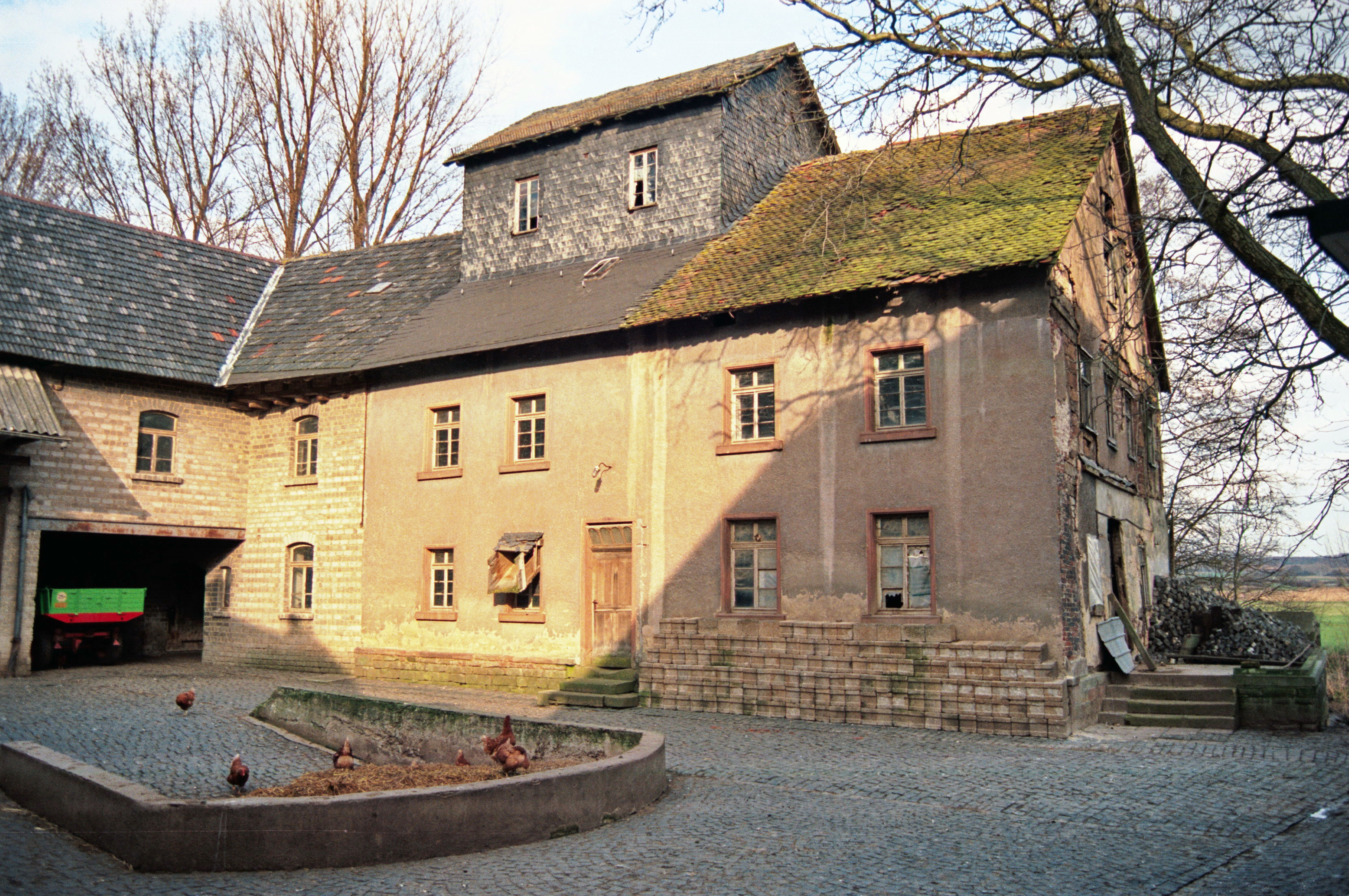 Utpher Mühle in Hungen - Utphe vom 24. 03. 1992 Hofseite. Digitalisiertes Negativ